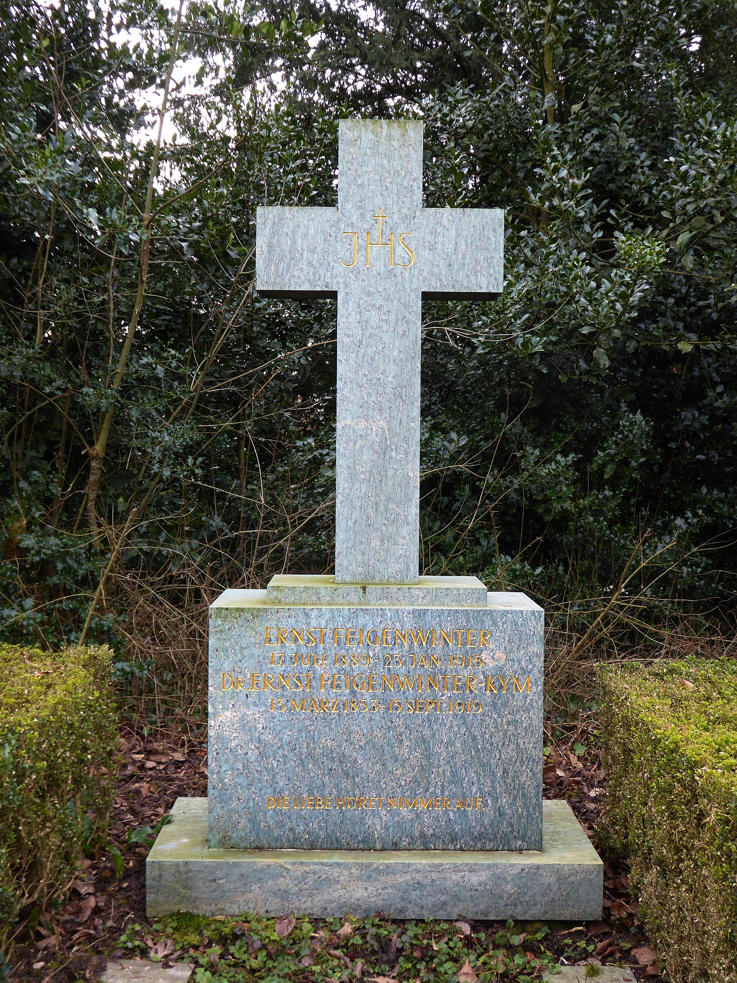 Ernst Feigenwinter-Kym (1853–1919) Dr. iur. Anwalt, Redaktor und Verwaltungsratspräs. des Basler Volksblatts, Politiker, Grab auf dem Friedhof Hörnli, Riehen, Basel-Stadt